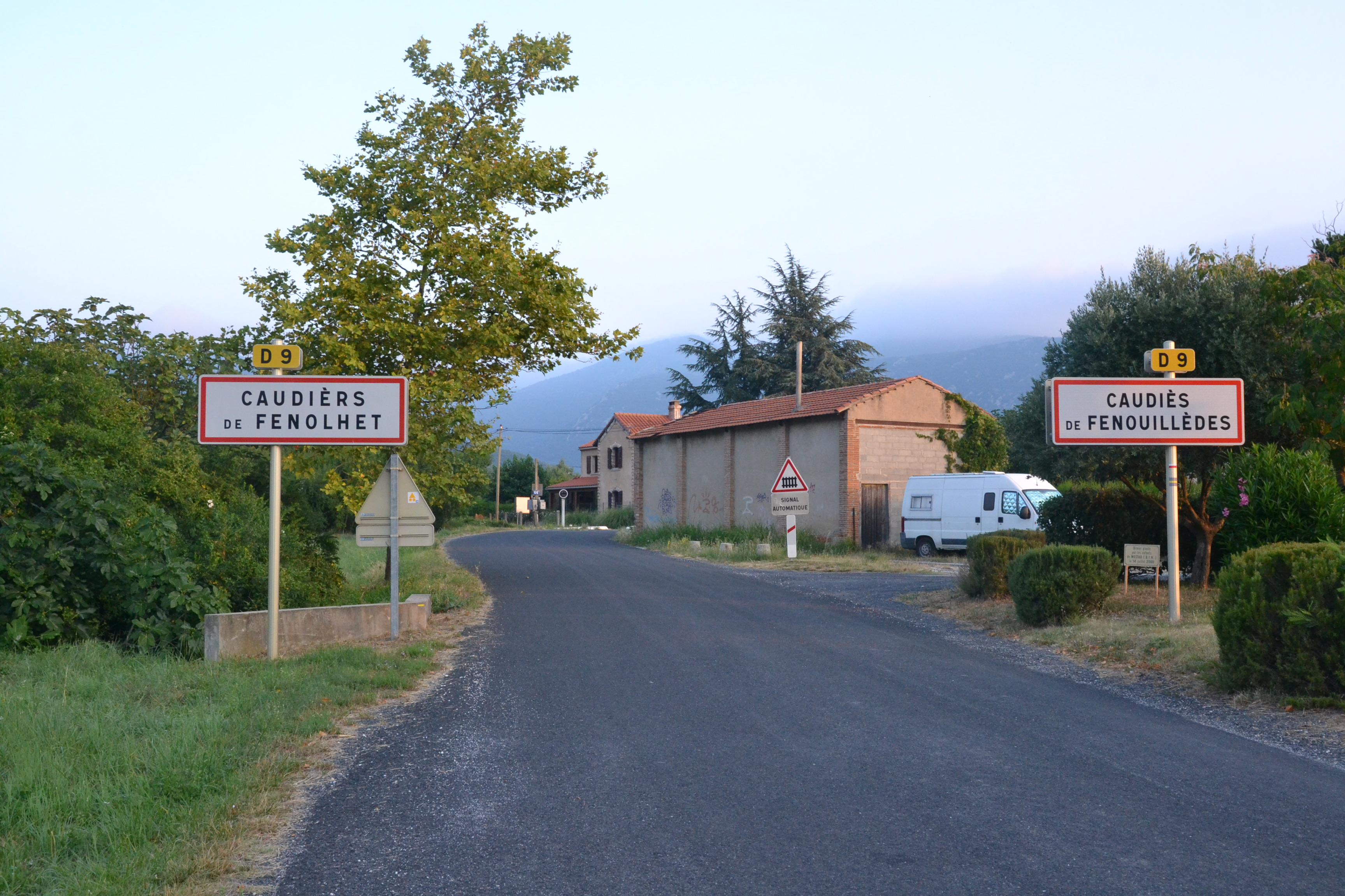 Panneaux d'entrée bilingues, Caudiès-de-Fenouillèdes (Pyrénées-Orientales, France).